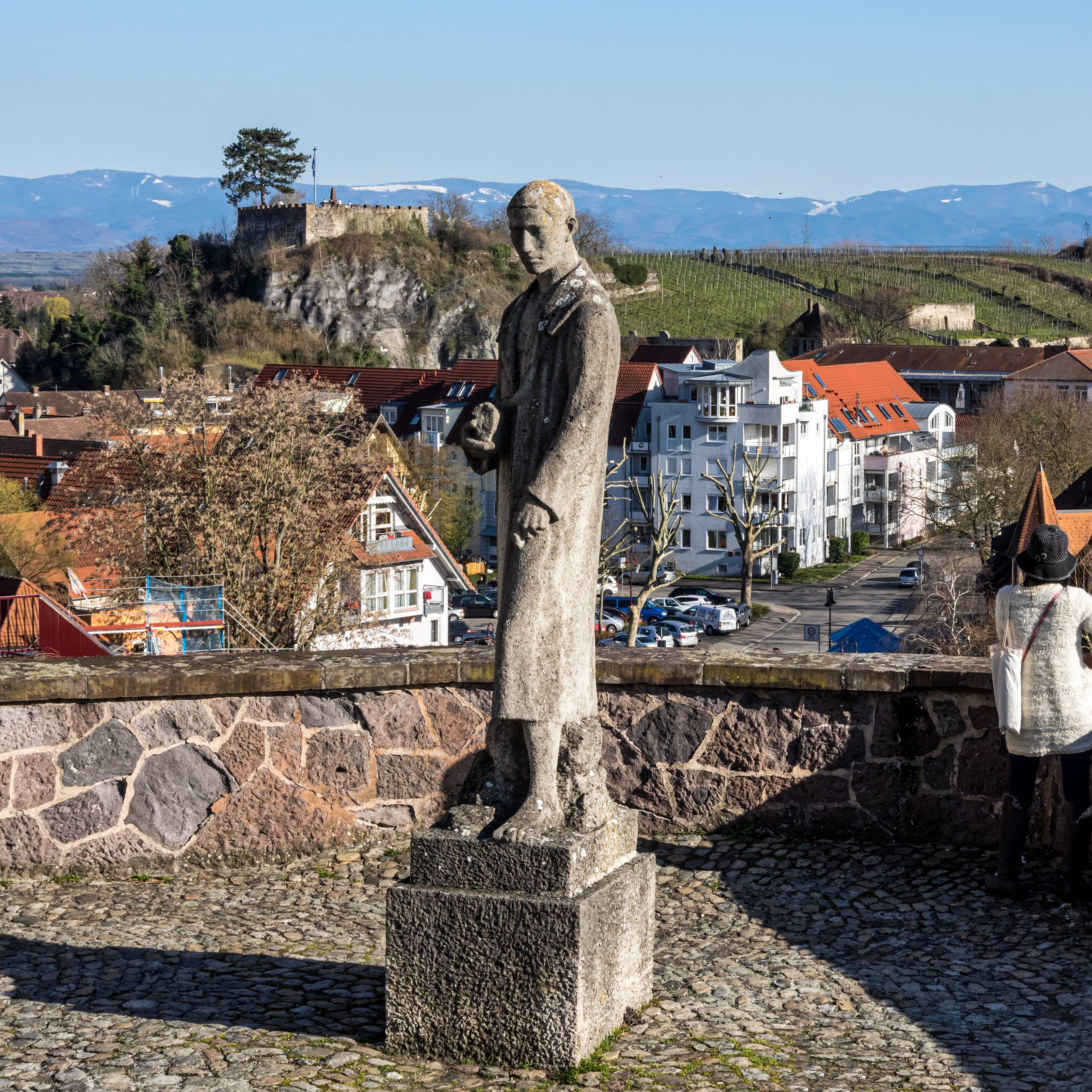 Bilder vom Münsterberg